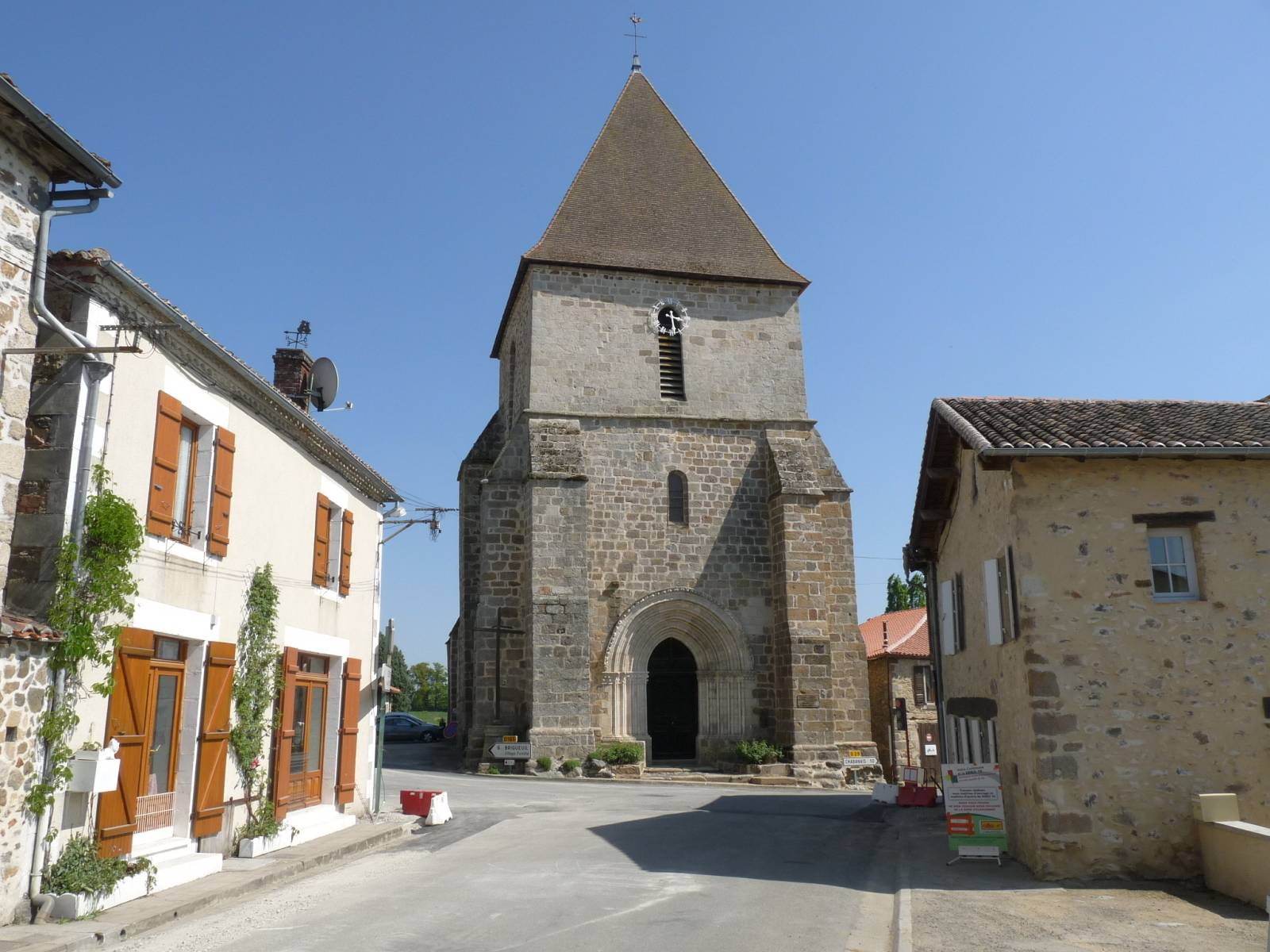 église de Saulgond, Charente, France